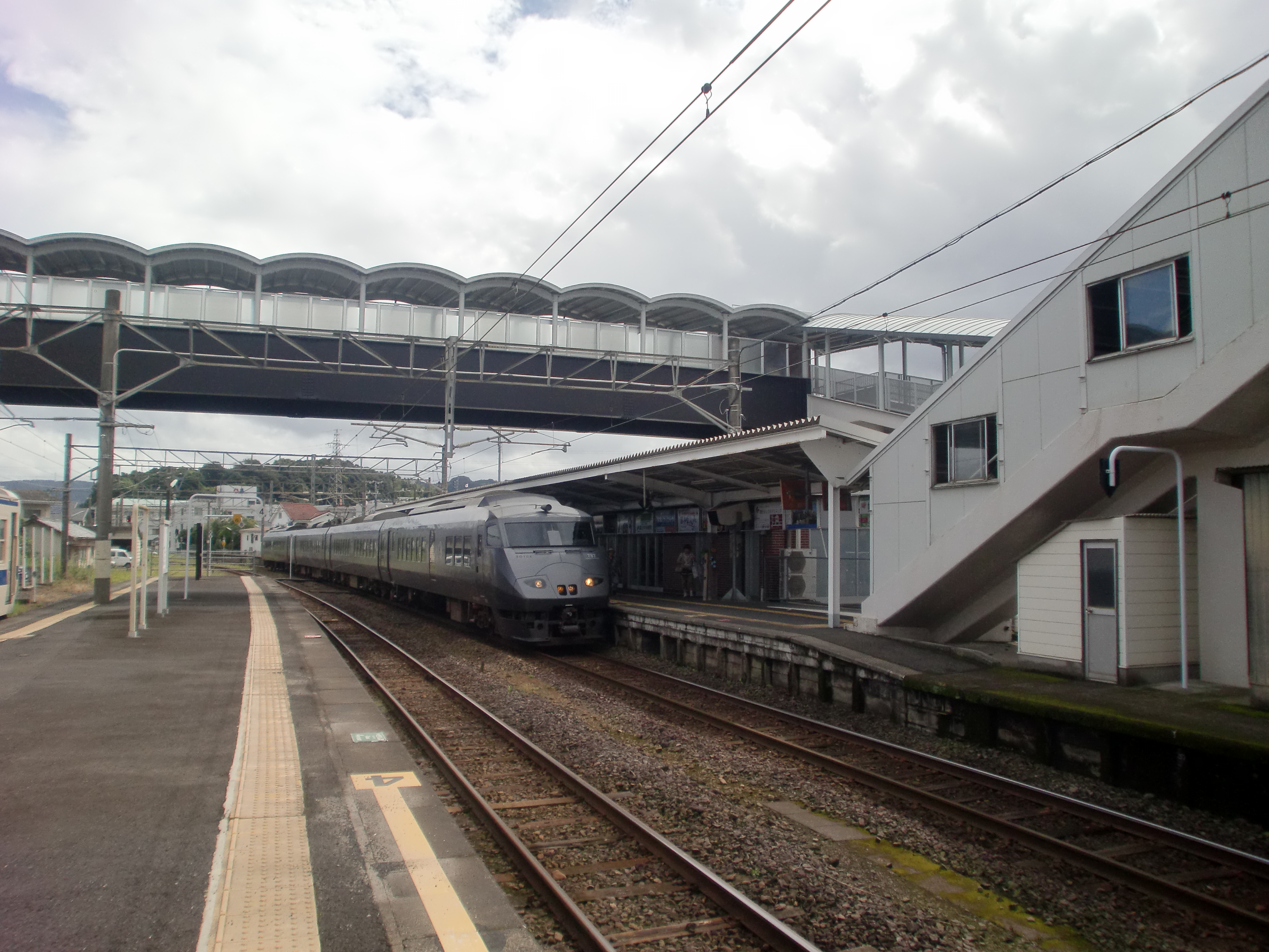 国分駅に停車中のJR九州787系電車（きりしま運用）。